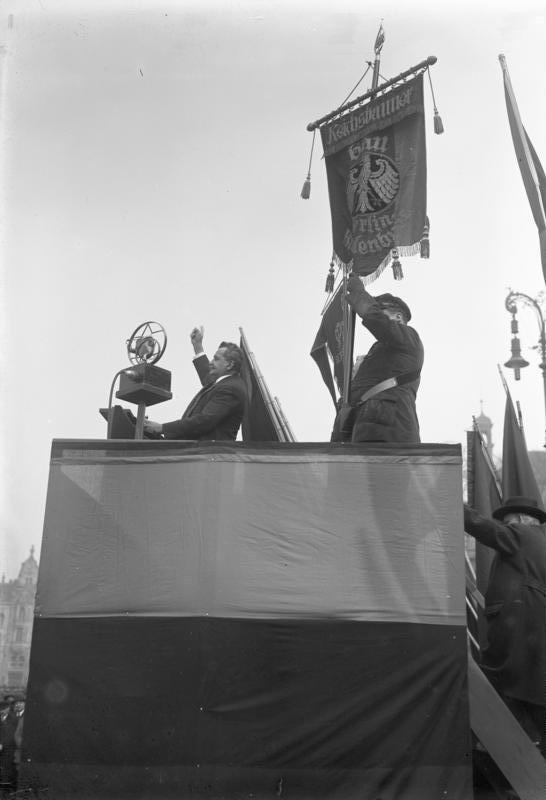 Riesenaufmarsch der republikanischen Verbände der "Eisernen Front" im Lustgarten in Berlin! Der sozialdemokratische Reichstagsabgeordnete Wels bringt von der Rednertribüne ein Hoch auf die Republik aus.